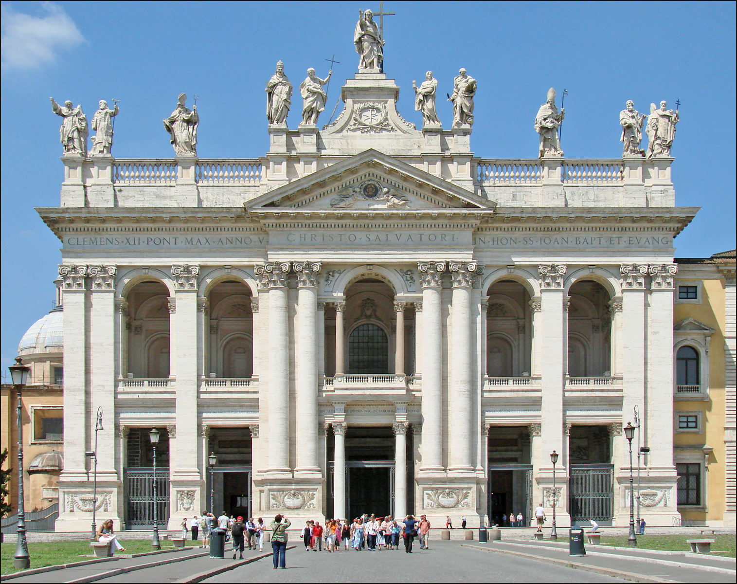 La façade de Saint-Jean-de-Latran La basilique Saint-Jean-de-Latran est la cathédrale de Rome, c'est le premier sanctuaire du Christianisme construit sur ce site, dès 312-313, par Constantin, le premier empereur romain devenu chrétien. La façade actuelle de Saint-Jean-de-Latran a été réalisée par Alessandro Galilei entre 1732 et 1735 sous la papauté de Clément XII. Elle est surmontée de onze statues de saints entourant le Christ, de Saint-Jean-Baptiste et Saint-Jean-l'Evangéliste. C'est l'une des quatre basiliques majeures de Rome.